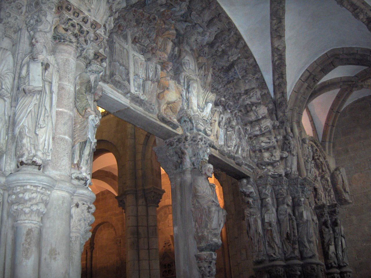 Portico de la Gloria; cathedral of Santiago de Compostela, Spain